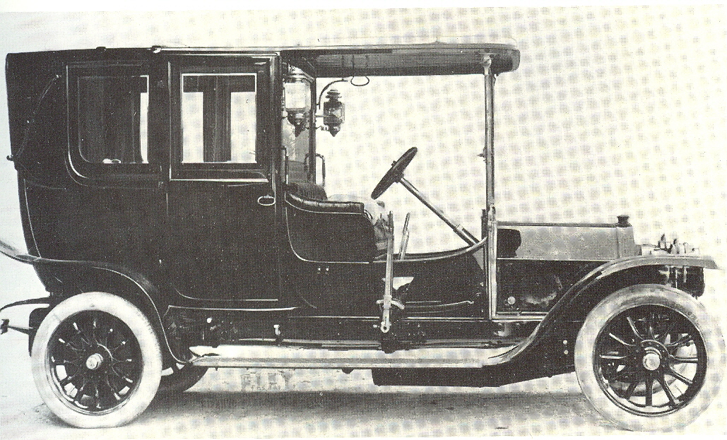 Fiat Tipo 3 (1910)